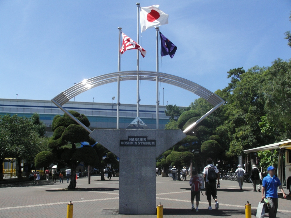 Hanshin Koshien Stadium